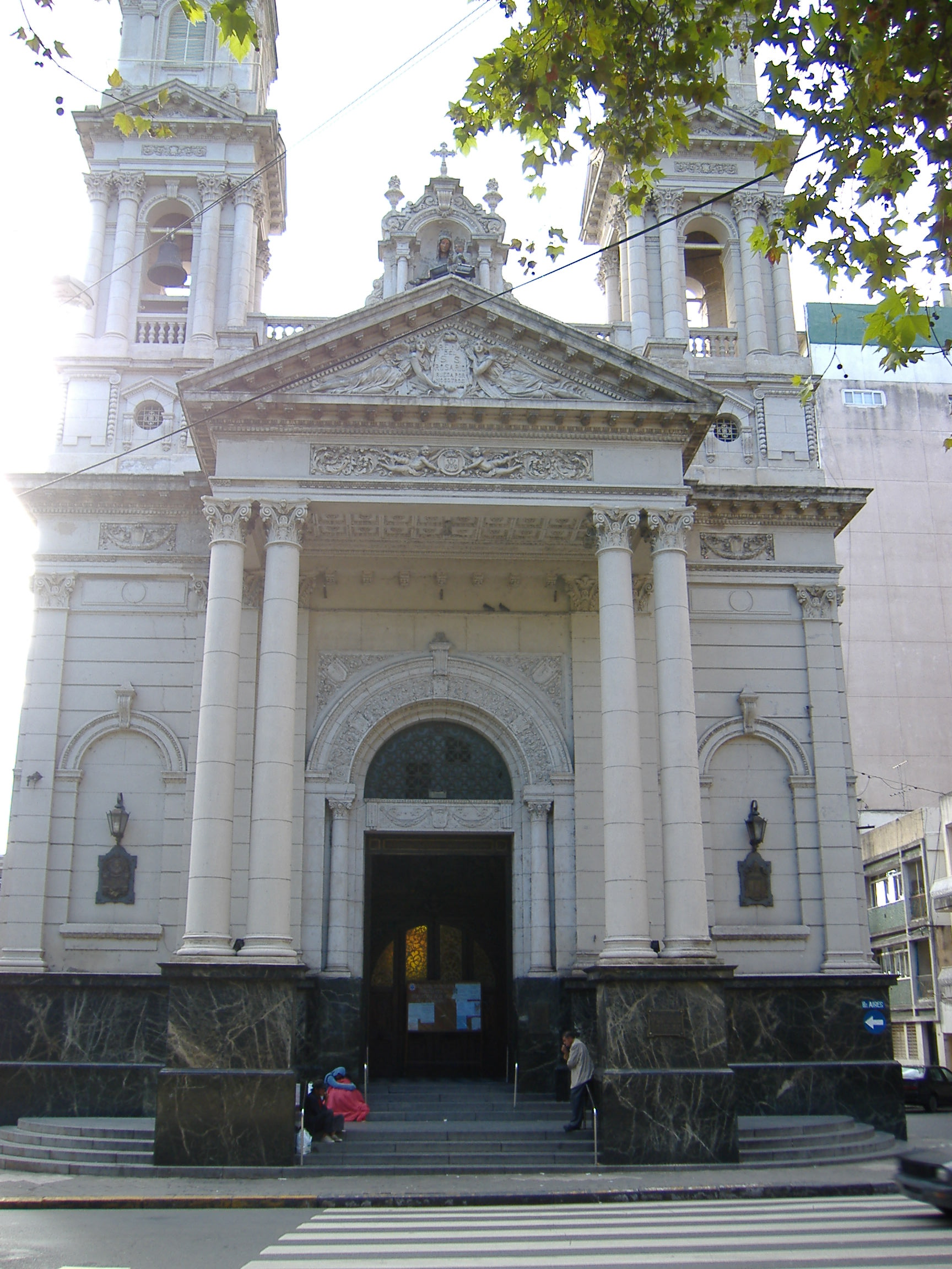 Catedral y Basílica Menor de Rosario Basilica Cathedral of Our Lady of the Rosary, in Rosario, Argentina. I, Pablo D. Flores, took this picture on 1 March 2006.